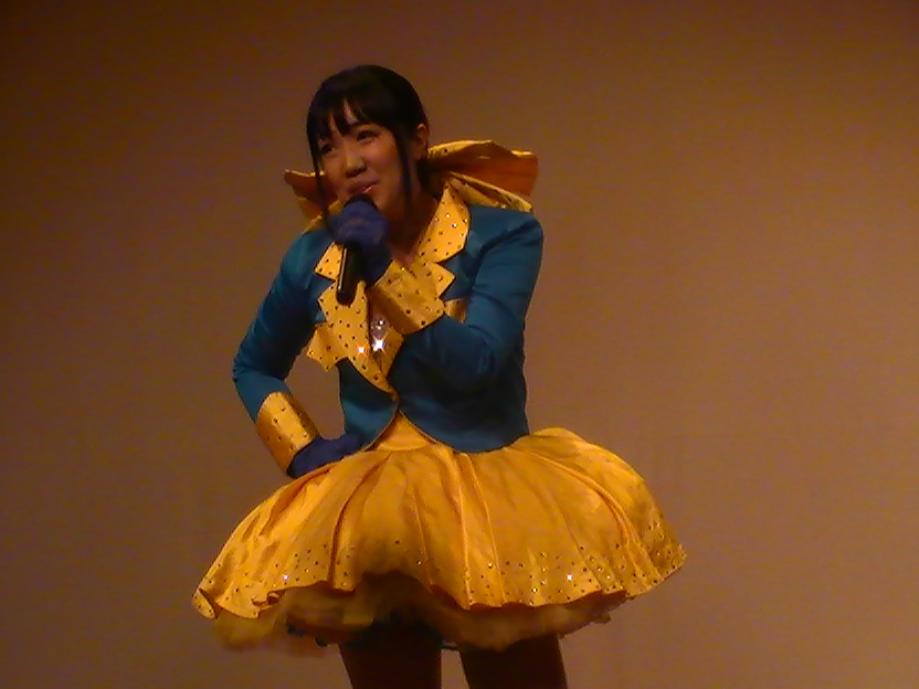 ナナちゃん (お笑い芸人) 2016年7月